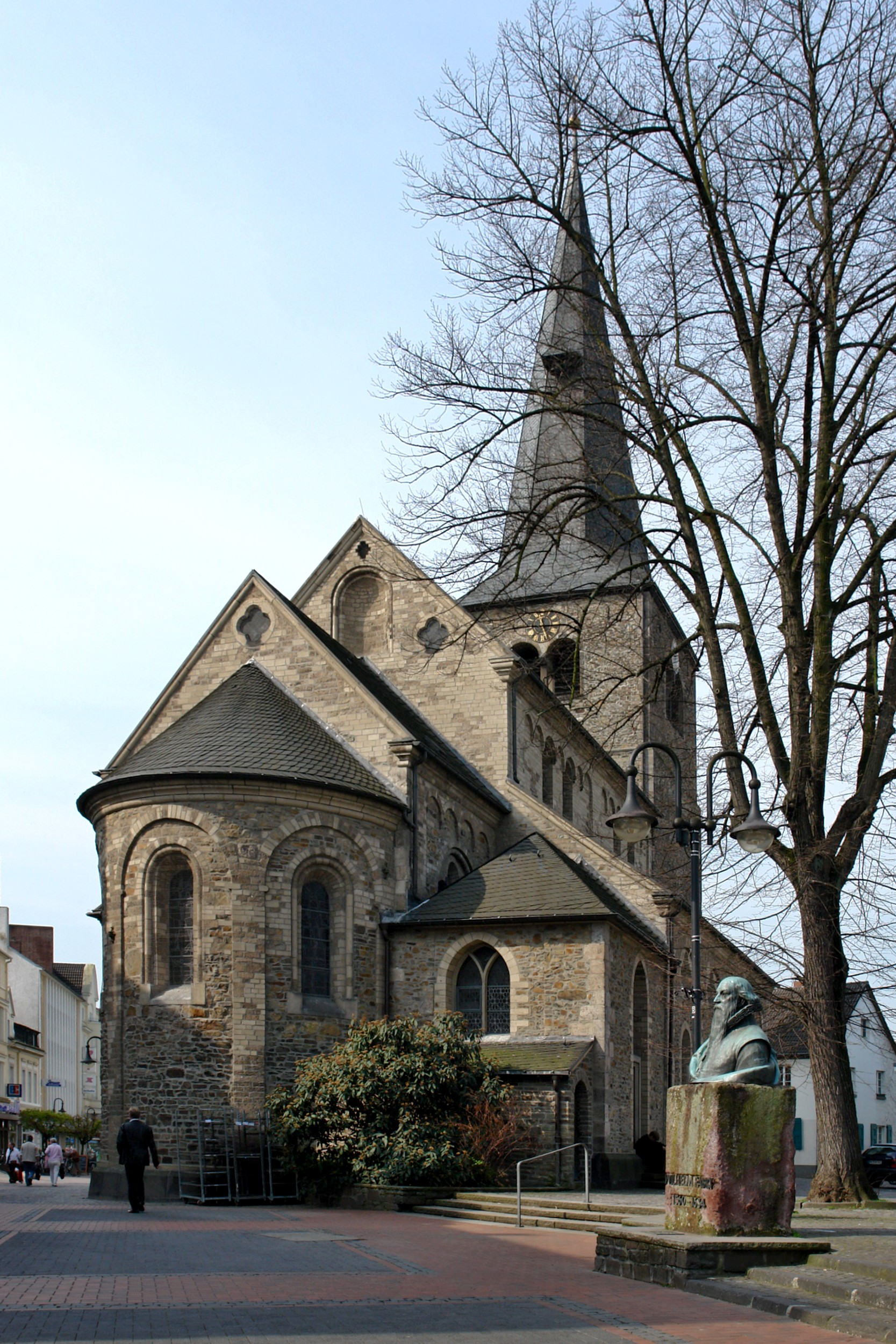 Reformationskirche, Hilden, Mittelstraße 66, erbaut um 1210 This is a photograph of an architectural monument.